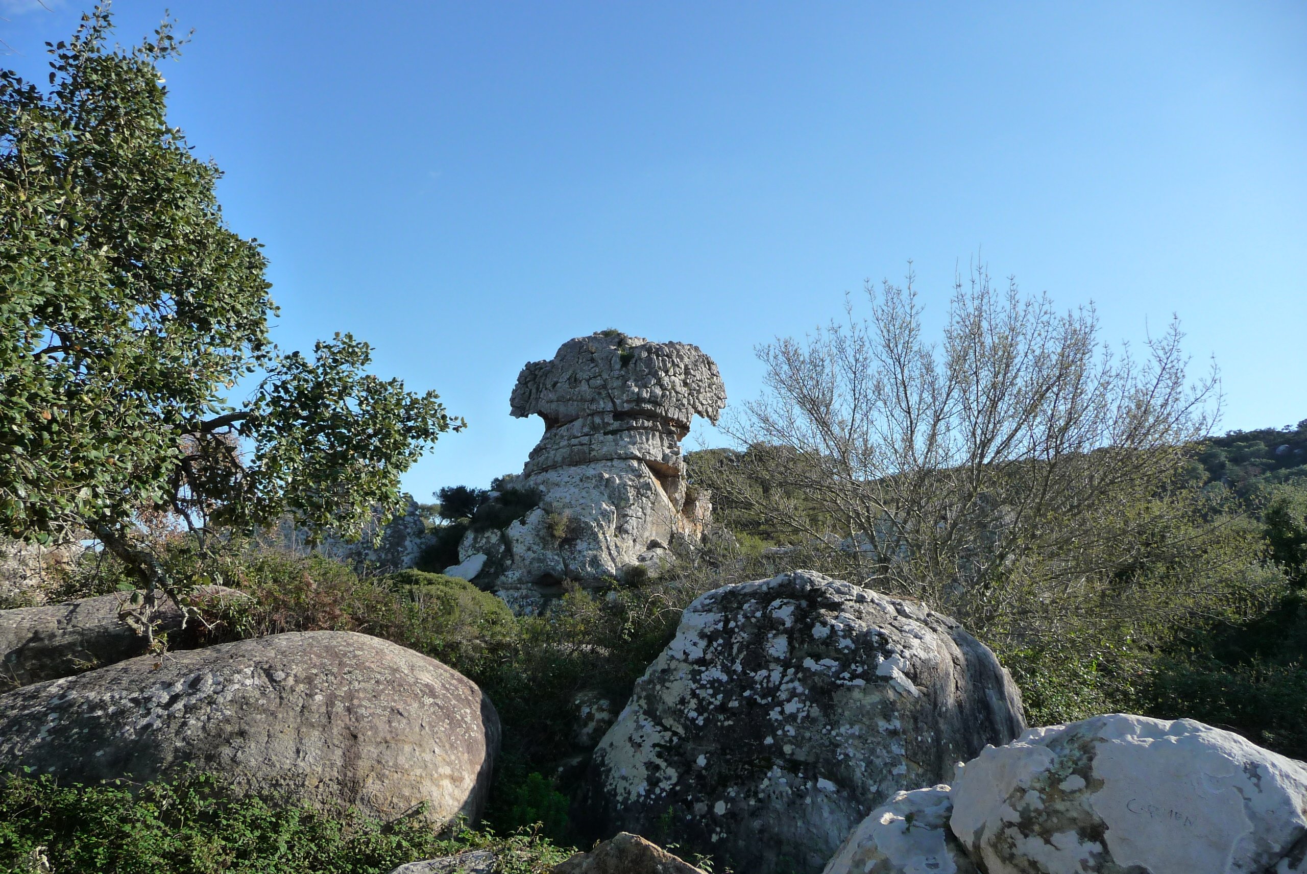 La Montera del Torero. Parque Natural de Los Alcornocales (Andalusia, Spain).